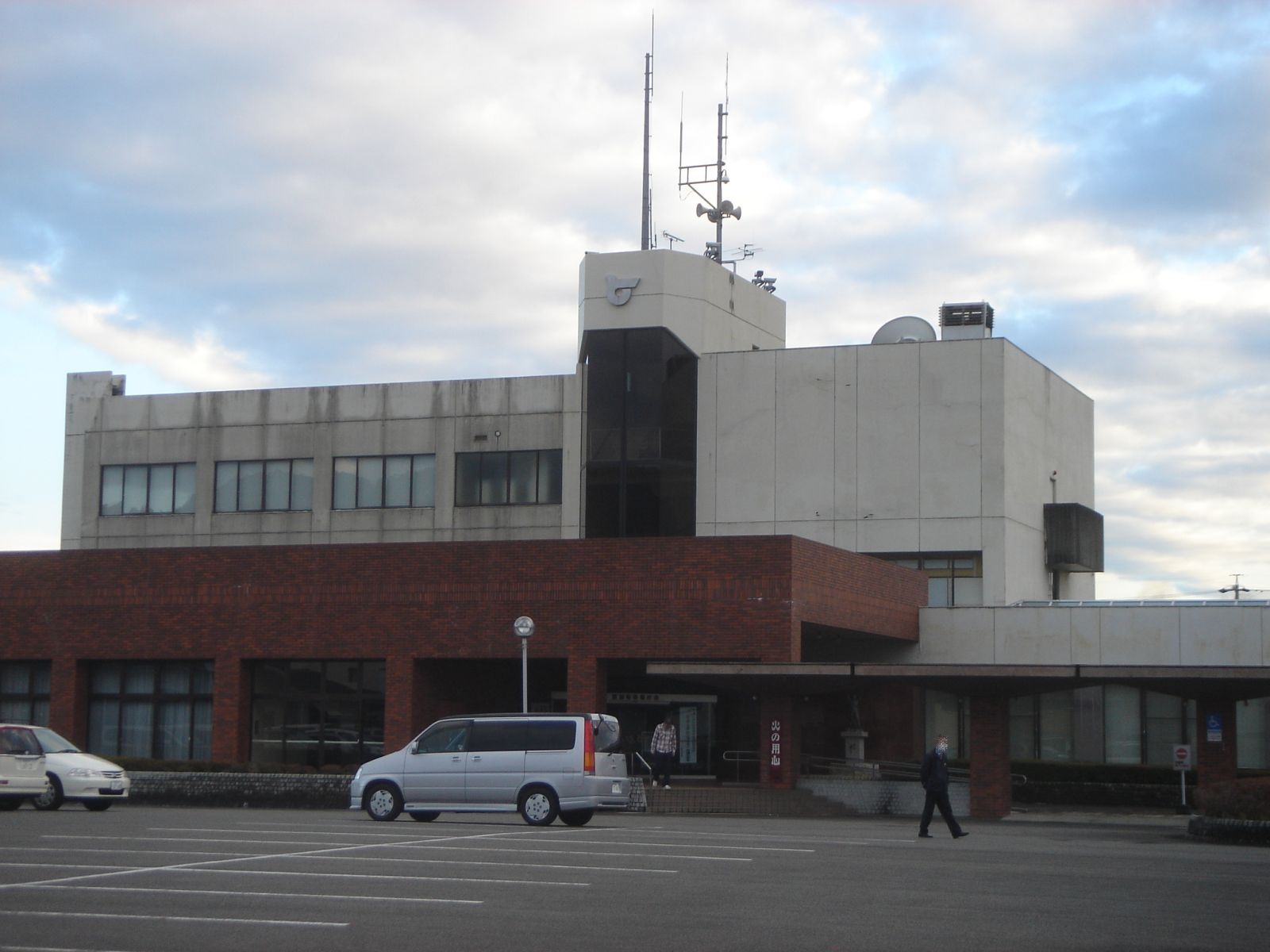 Tomika town office（富加町役場）,Tomika,Gifu,Japan(岐阜県富加町)で撮影。